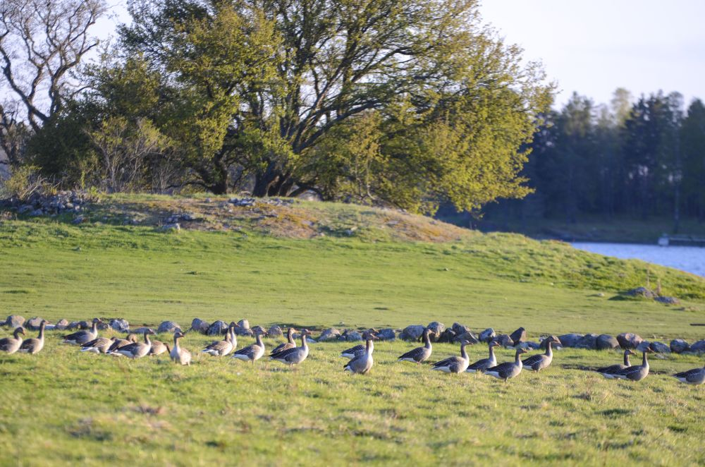 Langø er et viktig stoppested for beite og hvile. Her grågjess i stort antall.